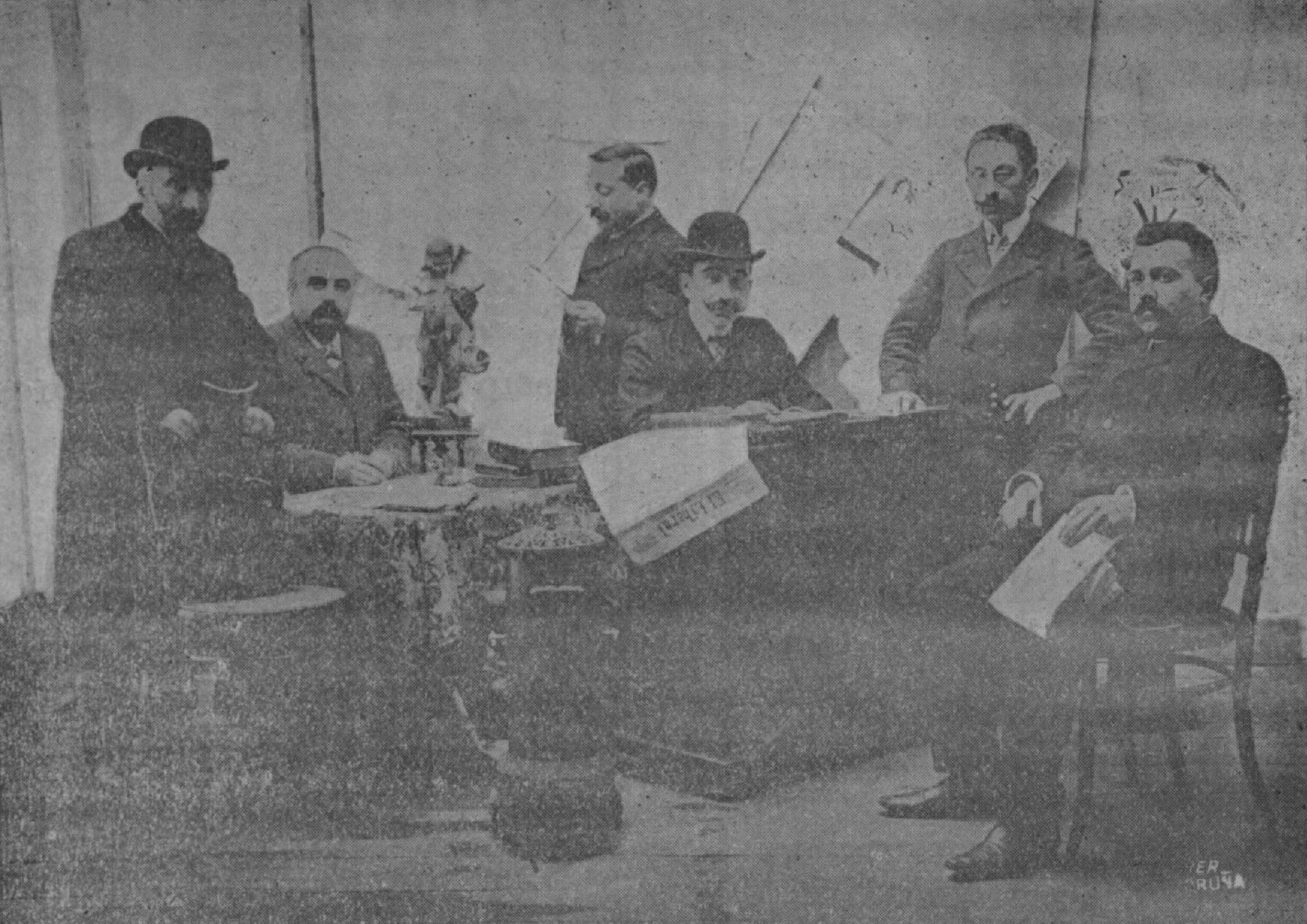 Redacción de La Idea Moderna de Lugo 1904. Aparecen: Enrique Rodríguez Garrido, Julio Núñez González, Antonio Menéndez Franco, José Vega Blanco, Luís Gago Alonso e Juan Rof Codina